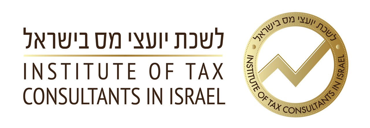 לוגו של לשכת יועצי המס